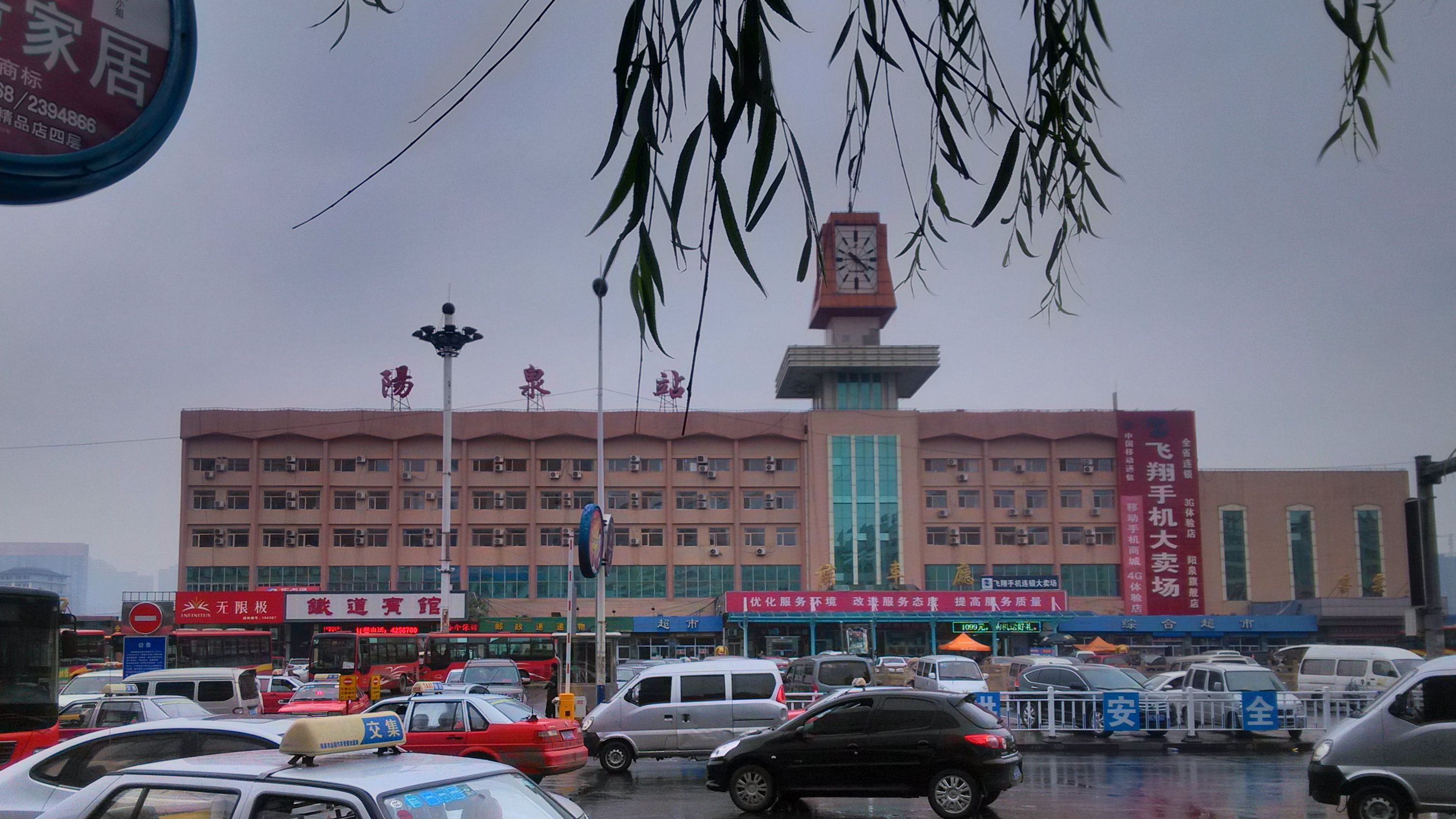 阳泉站。摄于山西省阳泉市。